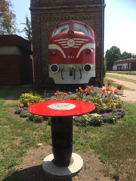 Az M61, 004 NOHAB mozdony Tapolcán